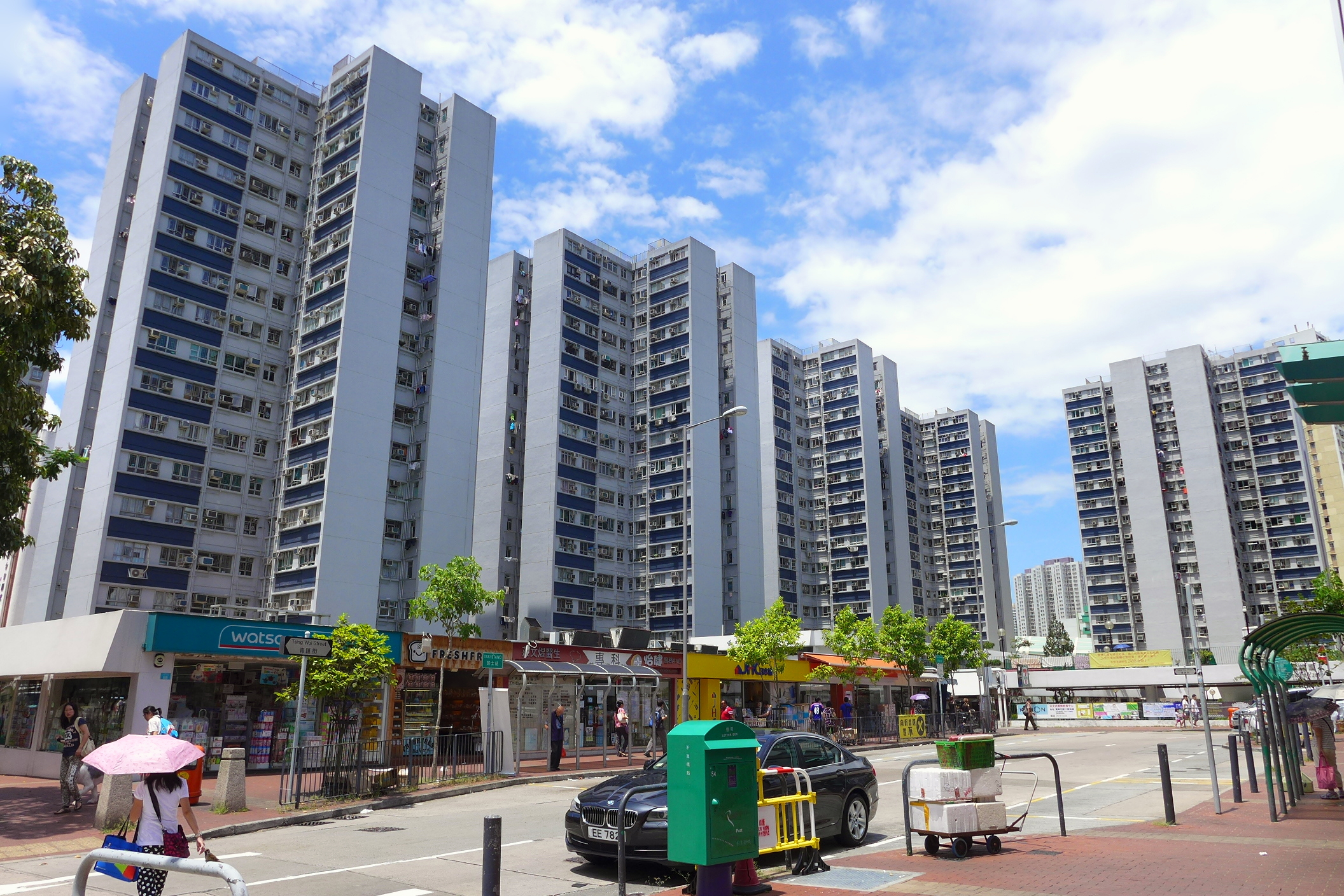 NChi Lok Garden